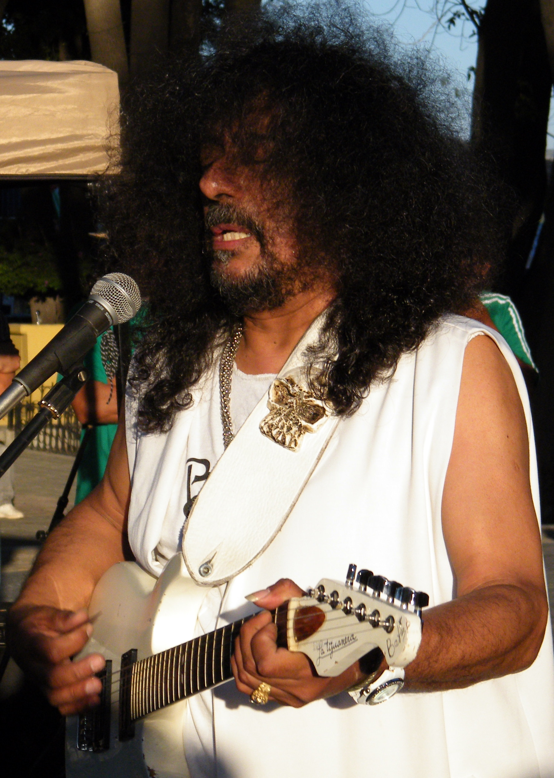 Javier Bátiz en una presentación de la clínica de guitarra eléctrica para jóvenes organizado por el ICBC.